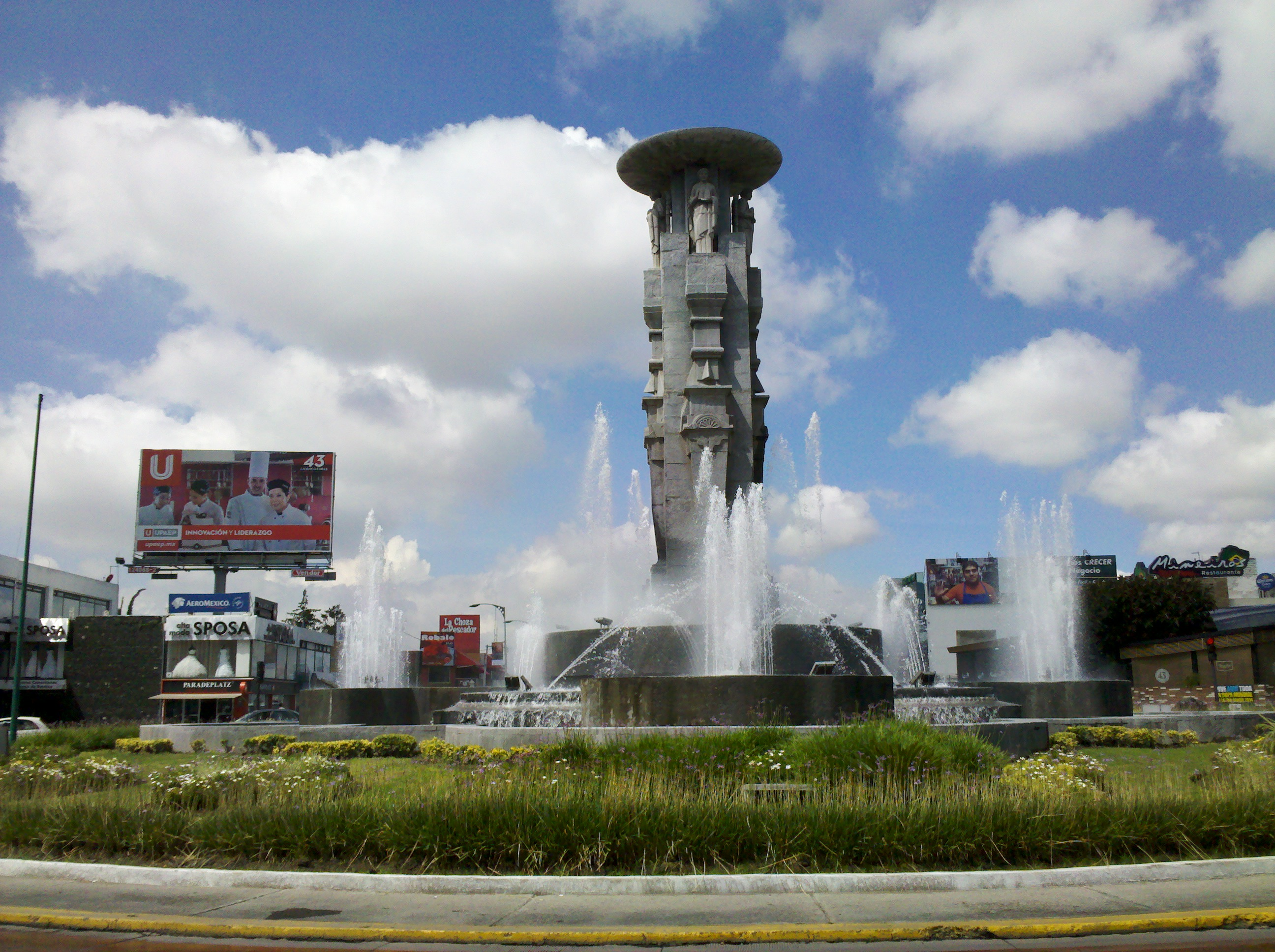 Fuente de los Frailes, Puebla, México. Avenida Juárez esquina con Boulevard Norte/Boulevard Atlixco.